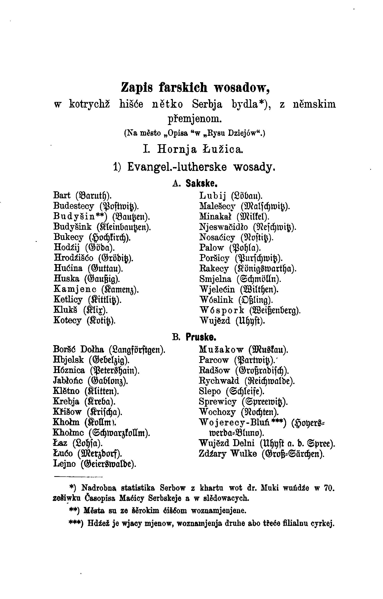 Historija serbskeho naroda od Michała Hórnika a Wilhelma Bogusławskeho, první strana po předmluvách